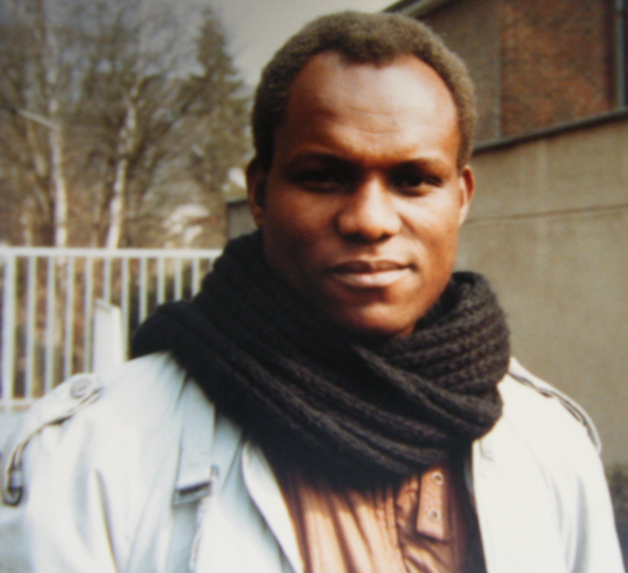 Henry Tayali, Zambian Artist, 1943-1987 (c.1983)